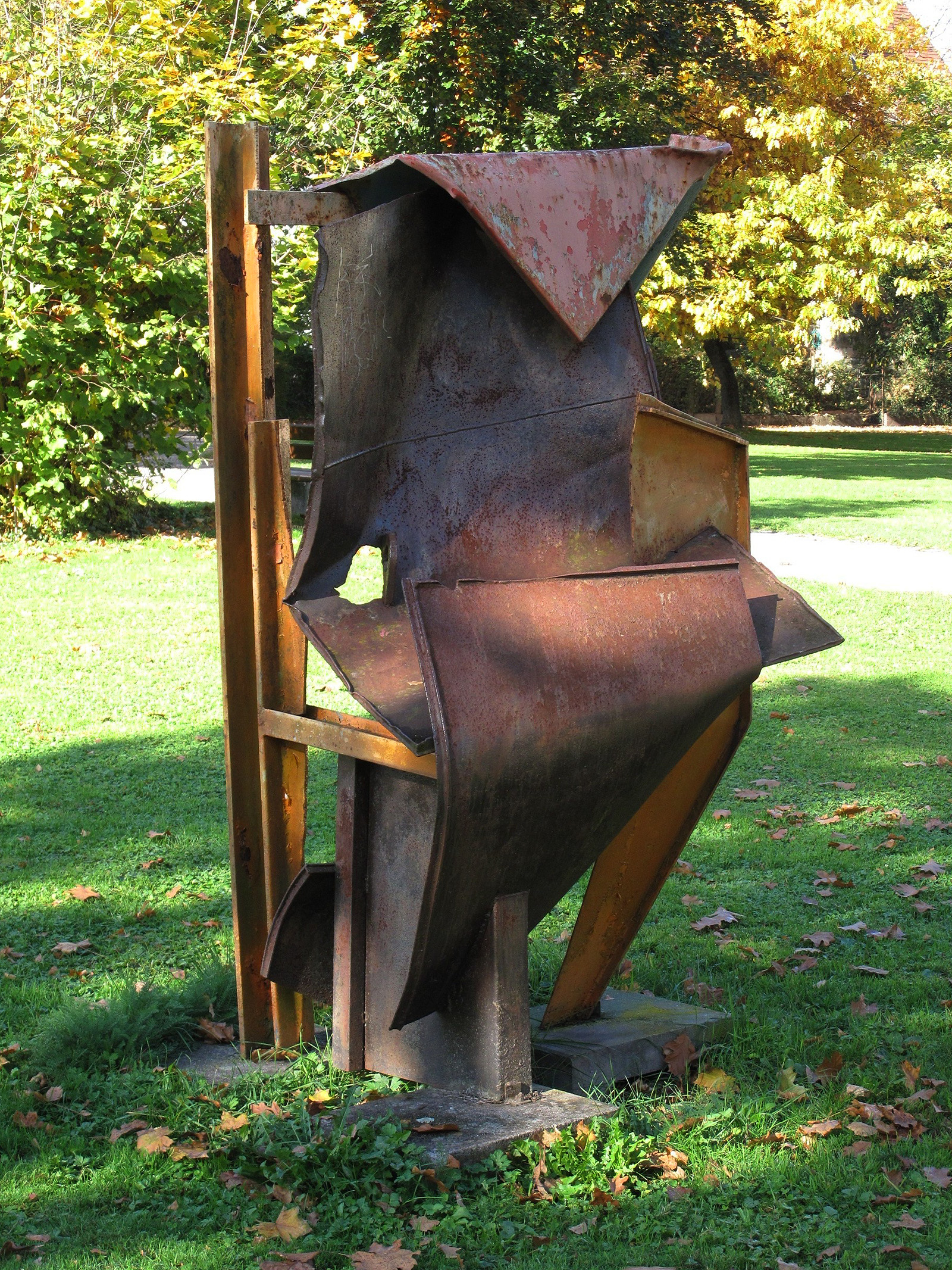 (26) Klaus H. Hartmann, Brandung, 1987, Schlosswallgüter